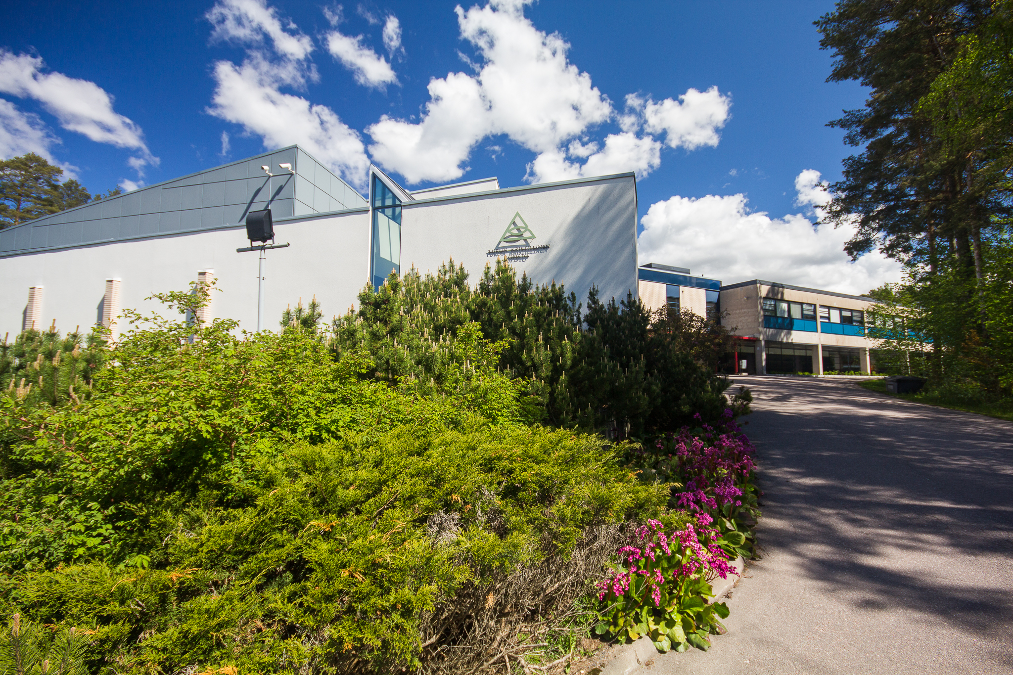 Turun kristillisen opiston päärakennus